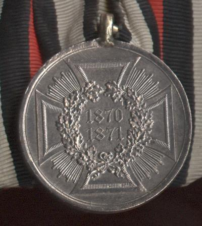 Deutsches Reich Kriegsdenkmünze, 1870-71, Nicht-Kombattanten, Rückseite